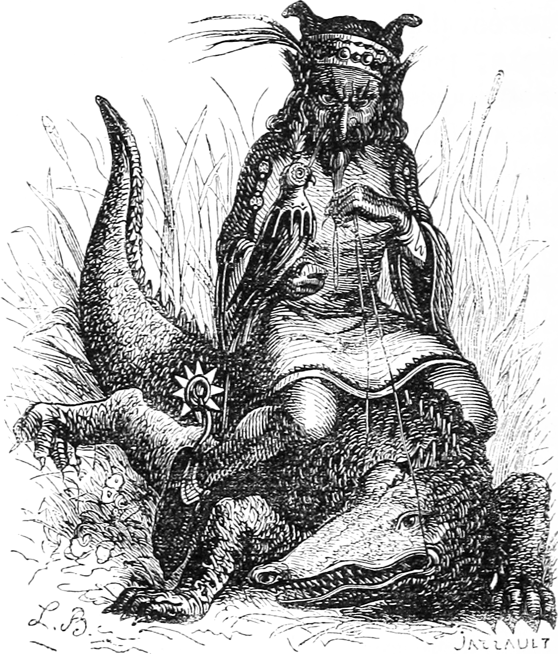 Une illustration pour l’article Aguarès dans le Dictionnaire infernal par Collin de Plancy.